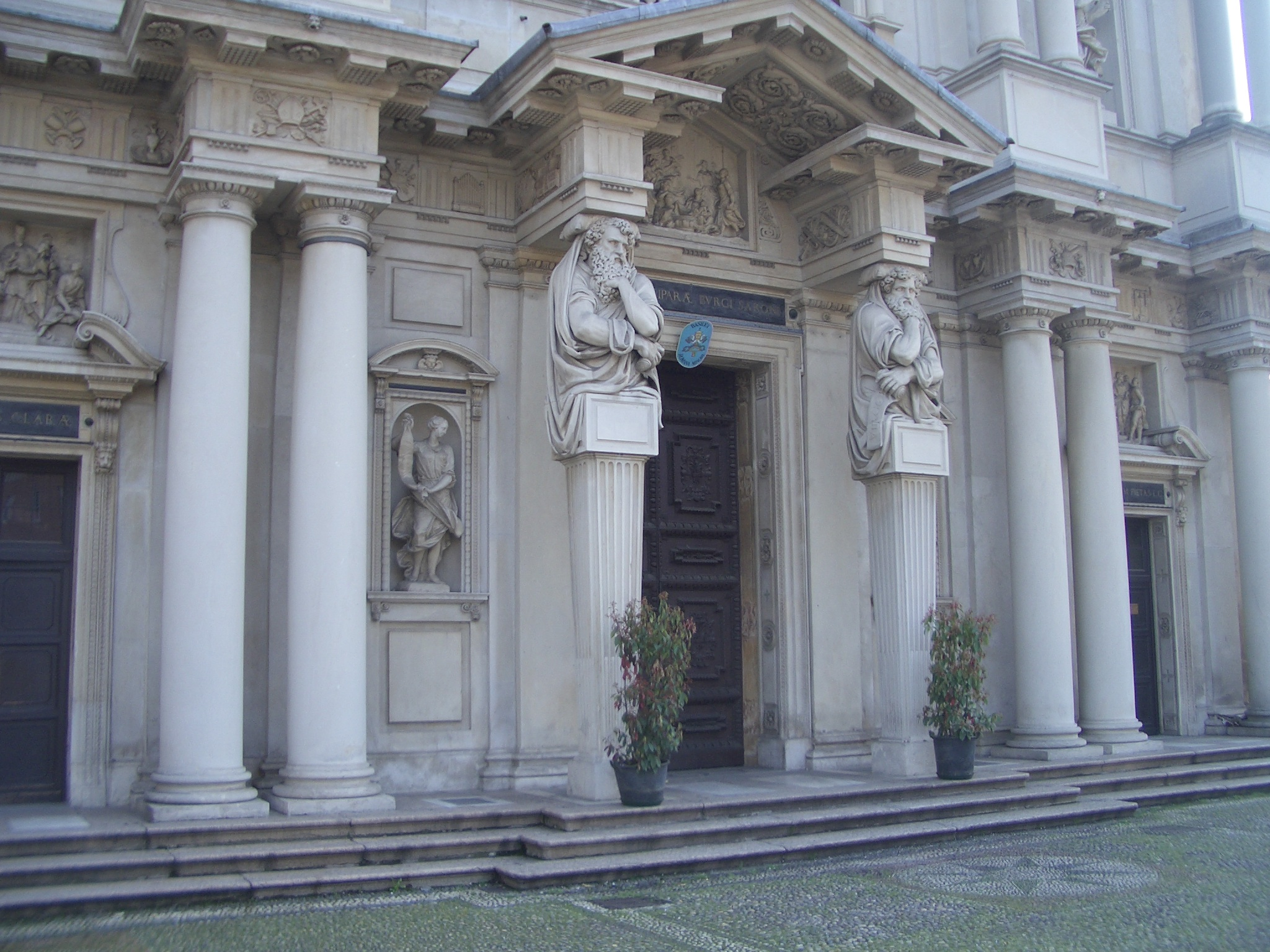 Santuario della Beata Vergine dei Miracoli, Saronno (Varese), Italy